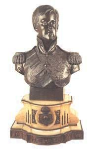 Zéphyrin Ferrez - Busto de Dom Pedro II, 1839